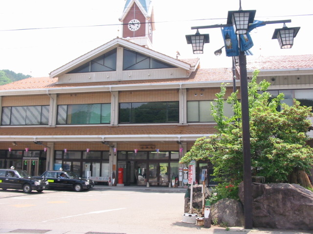 JR小海線小海駅